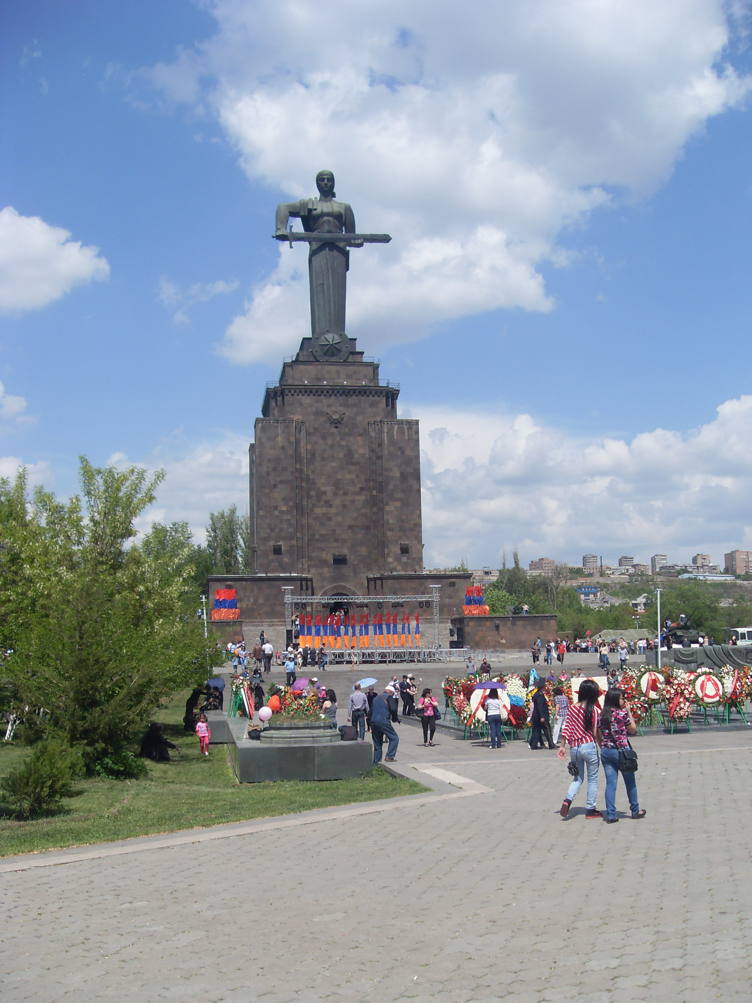 «Մայր Հայաստան» hուշարձան, 1968 թ., ճարտ.` Ռաֆայել Իսրայելյան, քանդ.` Արա Հարությունյան 12/10.3